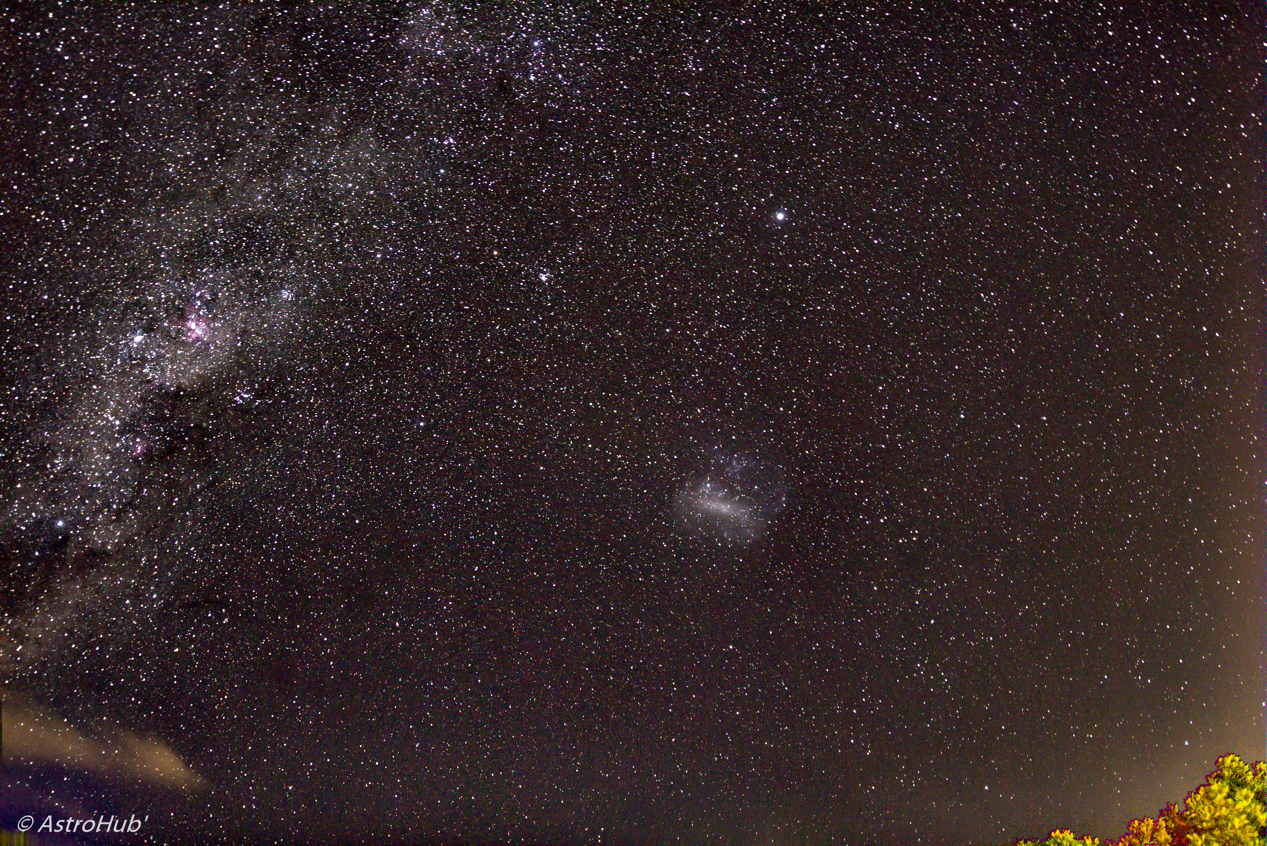 Photographie du Grand Nuage de Magellan sous la constellation de la Carène et de la Voie Lactée Canon 700D sur trépied fixe, 20 x 30s compositées sous Sequator puis traitement sous LightRoom - Objectif Tokina 11/16 à 16mm F2.8 3200 ISO